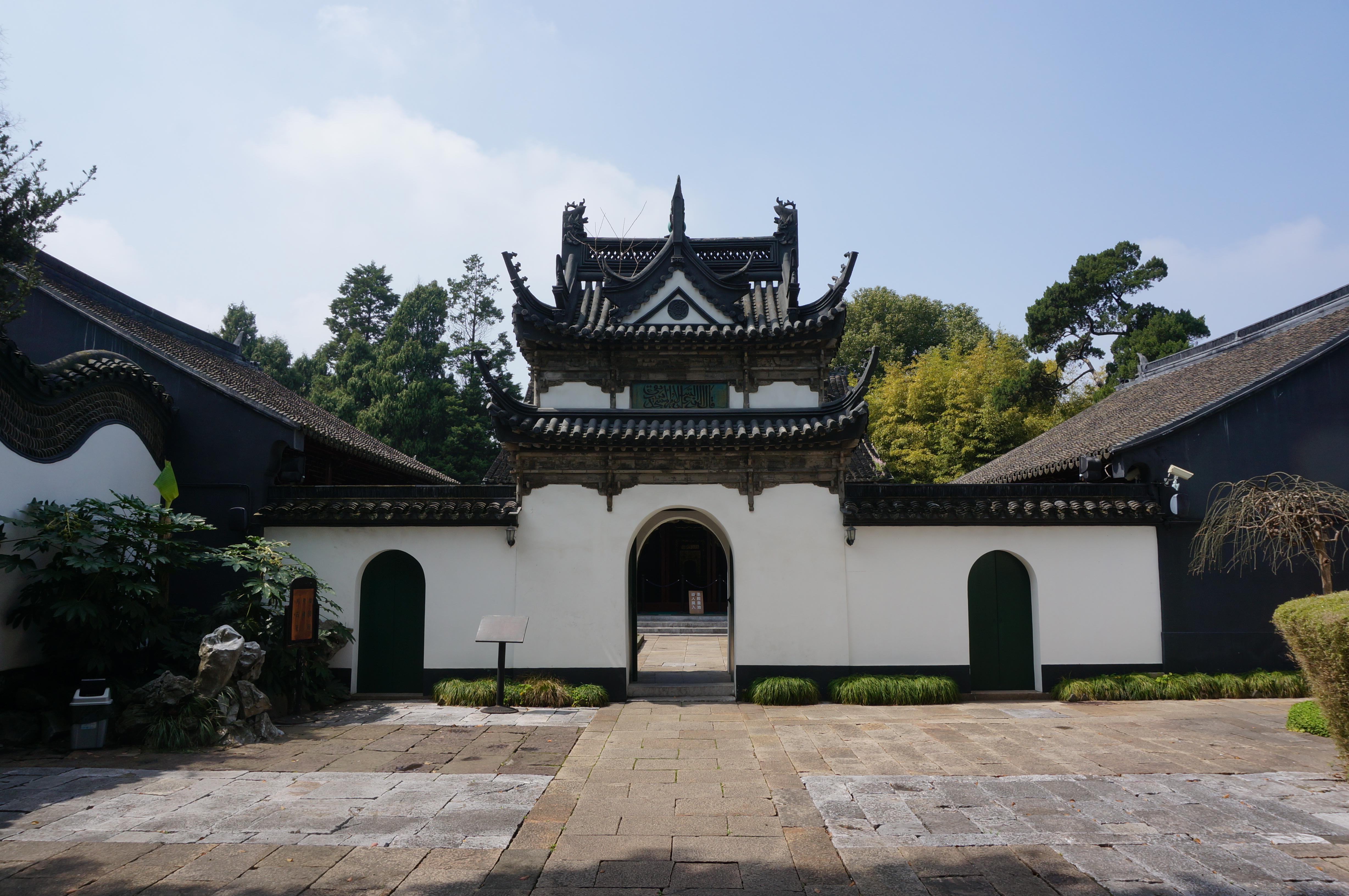 松江清真寺，邦克楼东侧（外侧）。